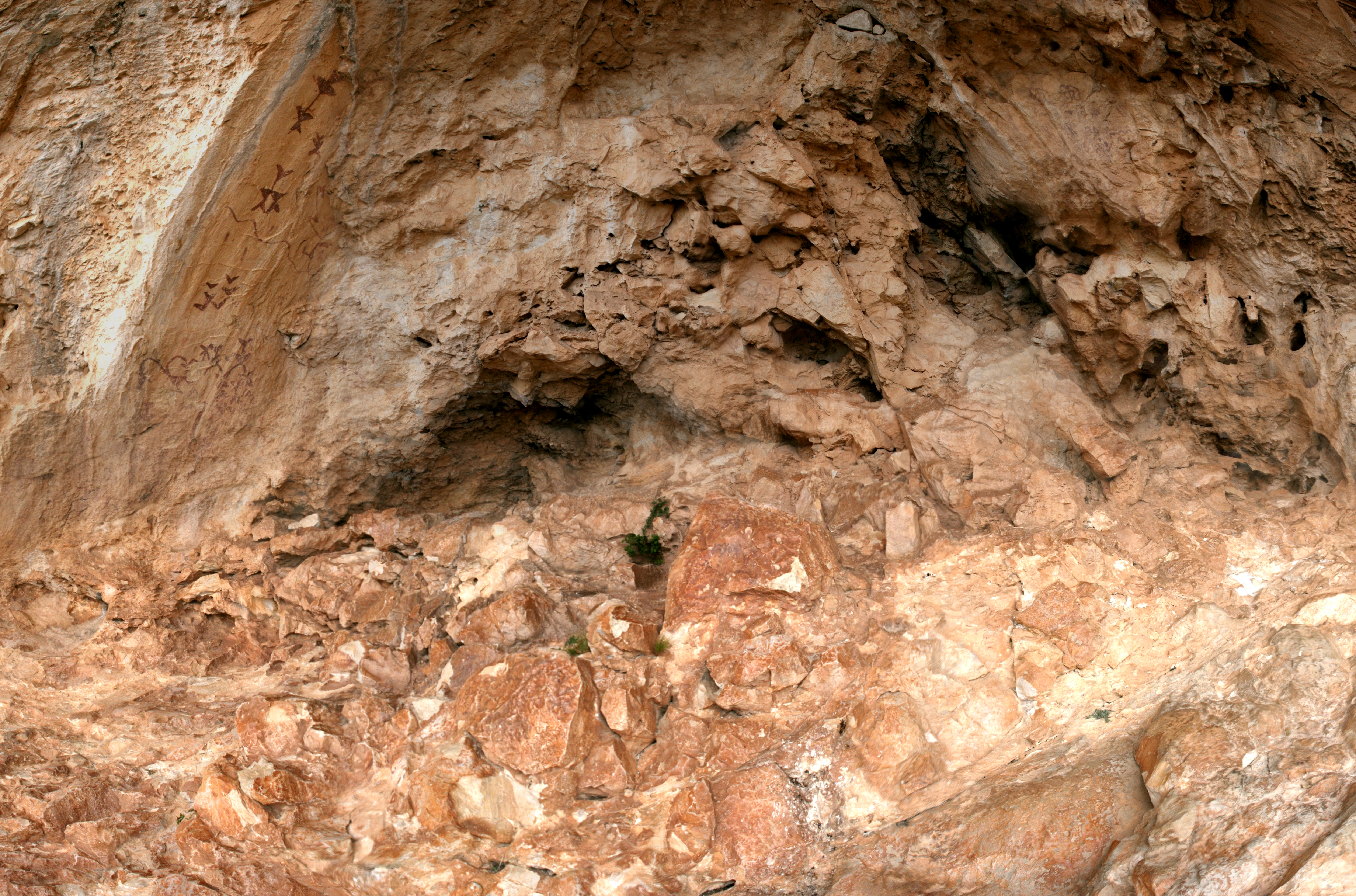 Cueva de los Letreros_Panorama abrigo completo